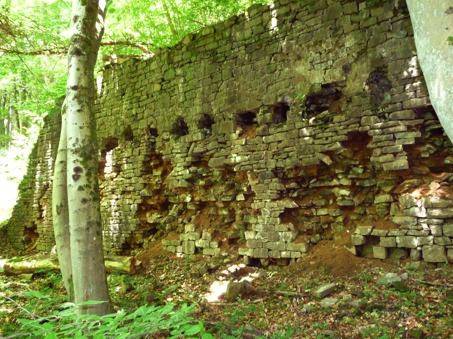 Reste der Verladestation (Grubenbahnhof)